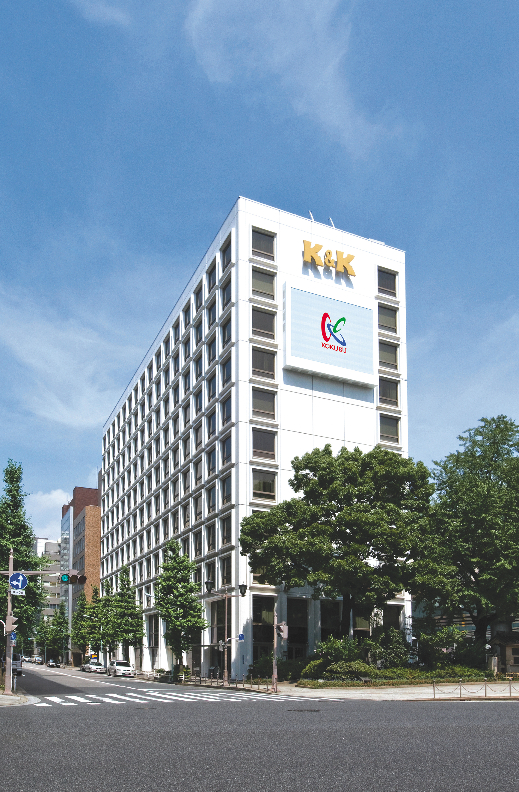 国分グループ本社